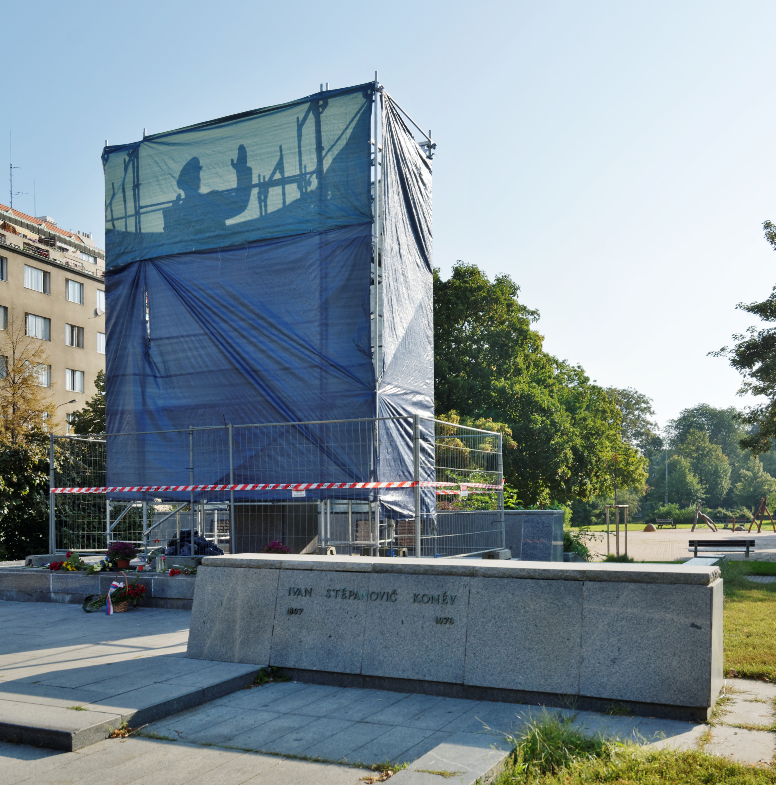 Pomník maršála Ivana Stěpanoviče Koněva na náměstí Interbrigády v Praze-Bubenči. Pomník nechala dne 30. srpna 2019 radnice Prahy 6 zahalit plachtou. Plachta byla později střžena. Na snímku stav 1. září 2019 v 9 hodin. Pomník opět zahalen.